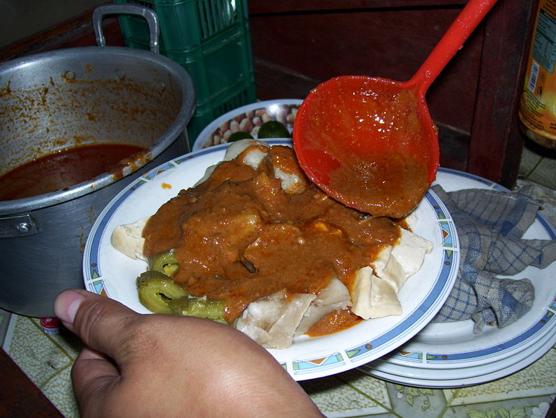 Siomay